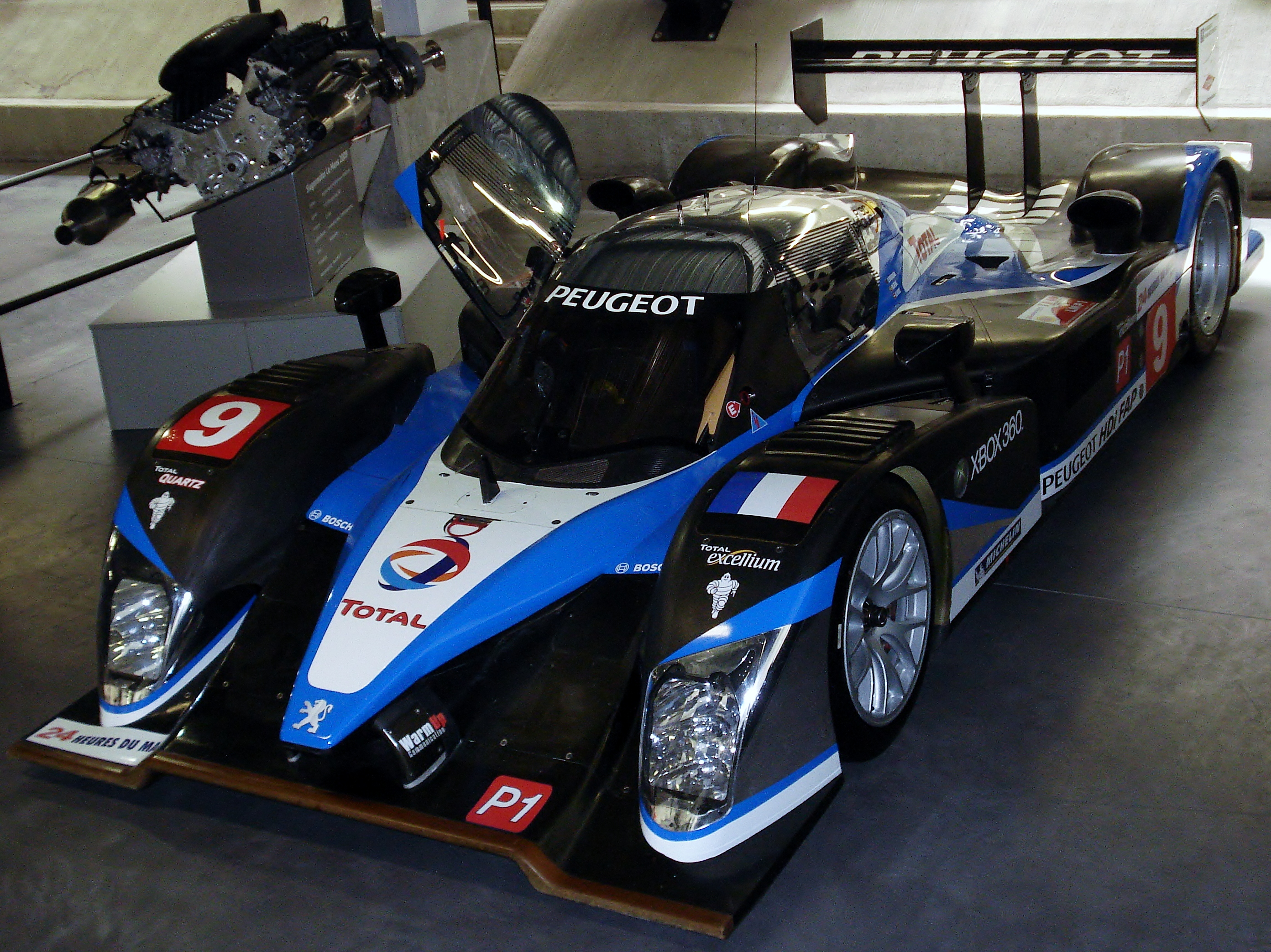 La Peugeot 908 victorieuse des 24 Heures du Mans 2009 et son moteur